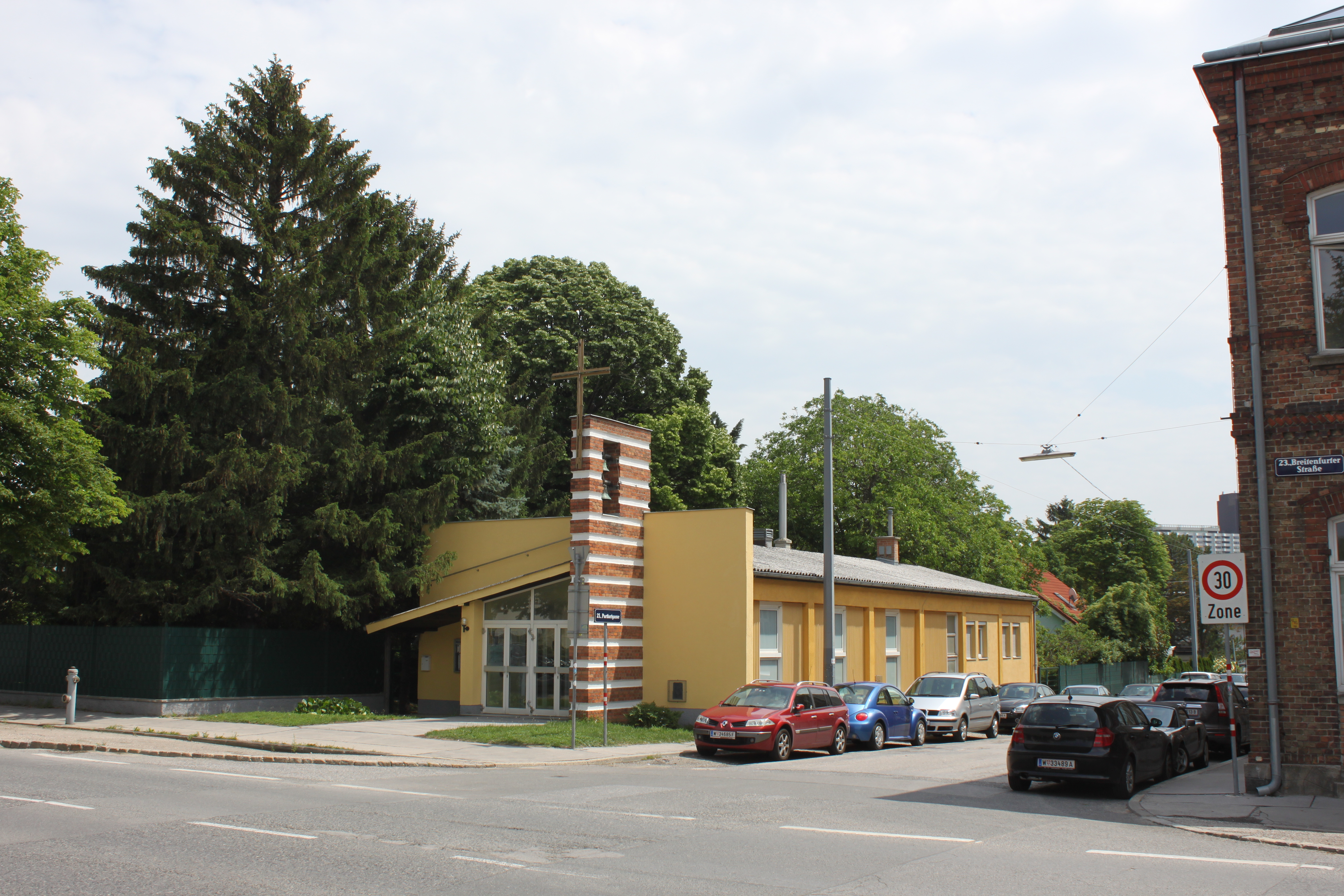 Filialkirche hl. Christophorus (Liesing), Portalfront zur Breitenfurter Straße, Längsfront zur Parttartgasse